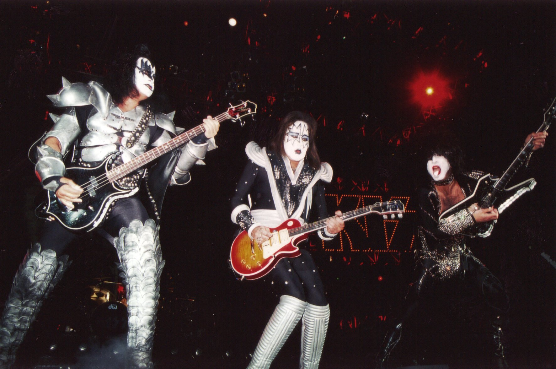 Emiliàn e rumagnòl: I Kiss (Gene Simmons, Ace Frehley e Paul Stanley) dal viv a Parìs durànt al "Psycho Circus World Tour". I èn tòlt zò a 'l palàs dal spòrt ad Bercy al 21 ad Mars dal 1999.